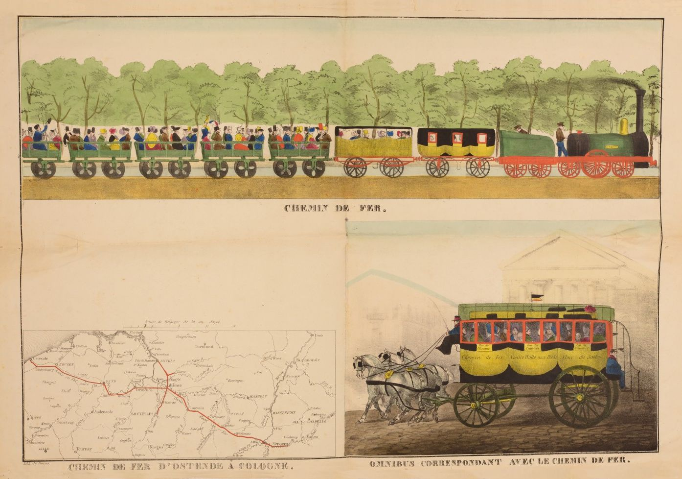 Lithografie, voorstellende de Belgische spoortrein "La Rapide", een op de trein aansluiting gevende paardenomnibus en een kaartje van België met ingetekend de spoorlijnen Oostende-Mechelen-Verviers (-Keulen) en Antwerpen-Brussel, z.d. 1 stuk